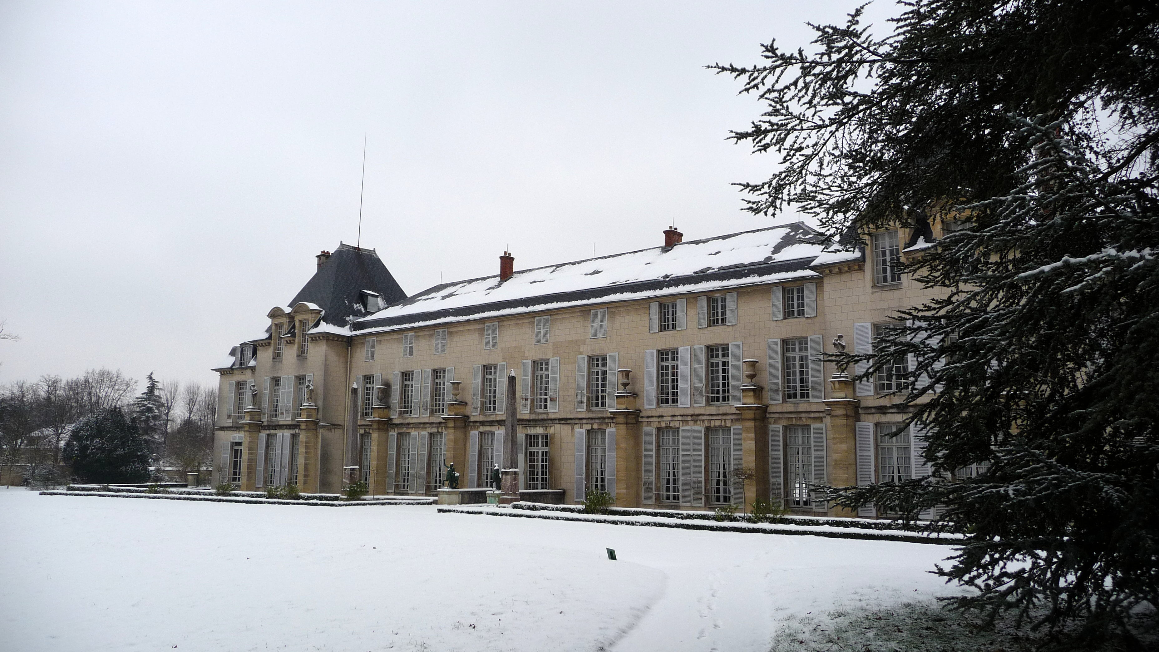 Le Parc de la Malmaison sous la neige